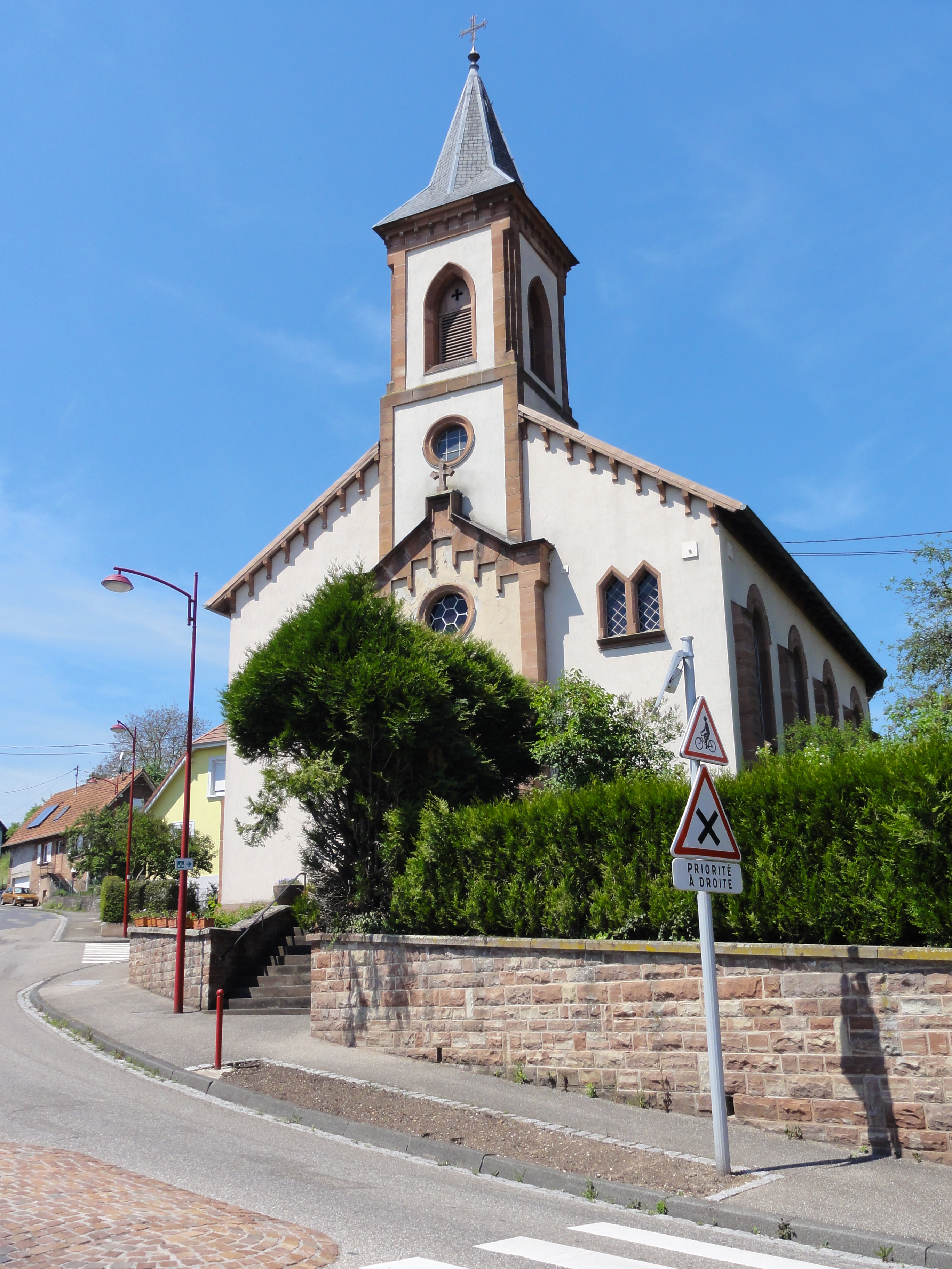 Alsace, Bas-Rhin, Zinswiller, Église protestante (1862), Grand'Rue.